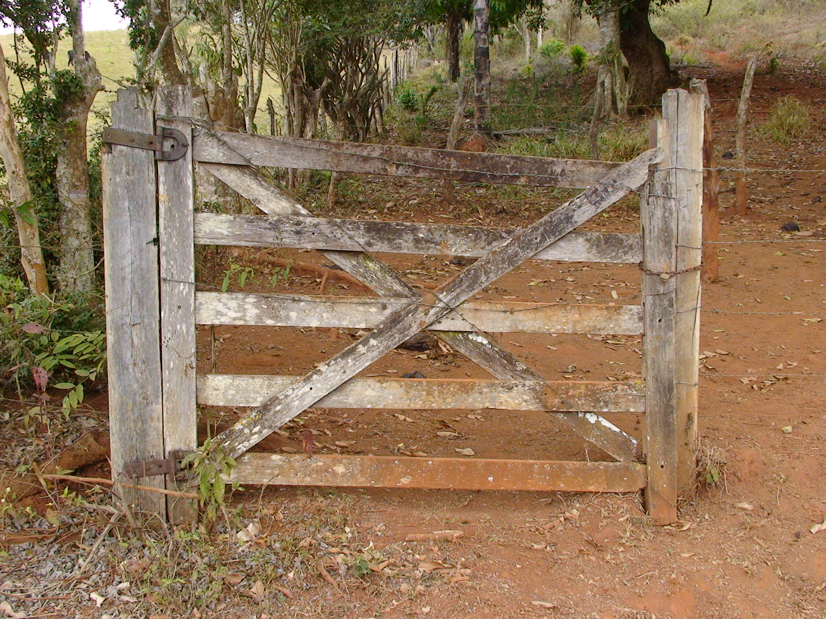 Porteira antiga em Sto Antônio do Rio Abaixo (MG)